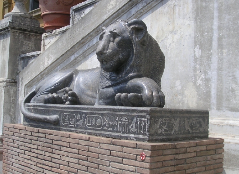 Statue d'un lion inscrite au nom de Nectanébo Ier - XXXe dynastie égyptienne - Museo Gregoriano du Vatican - Rome